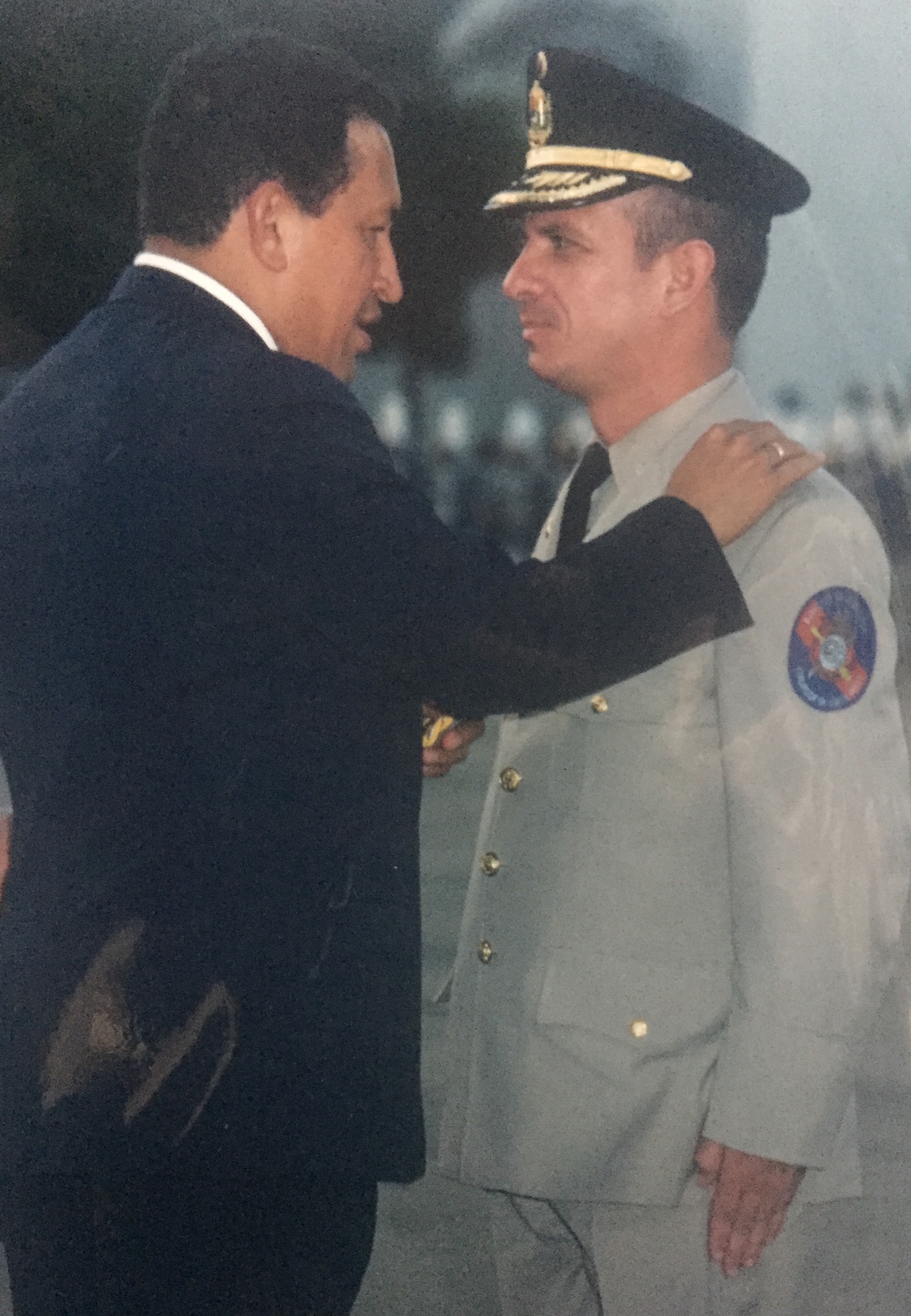 Mayor General Hugo Carvajal Barrios junto a presidente Hugo Chávez Frías.